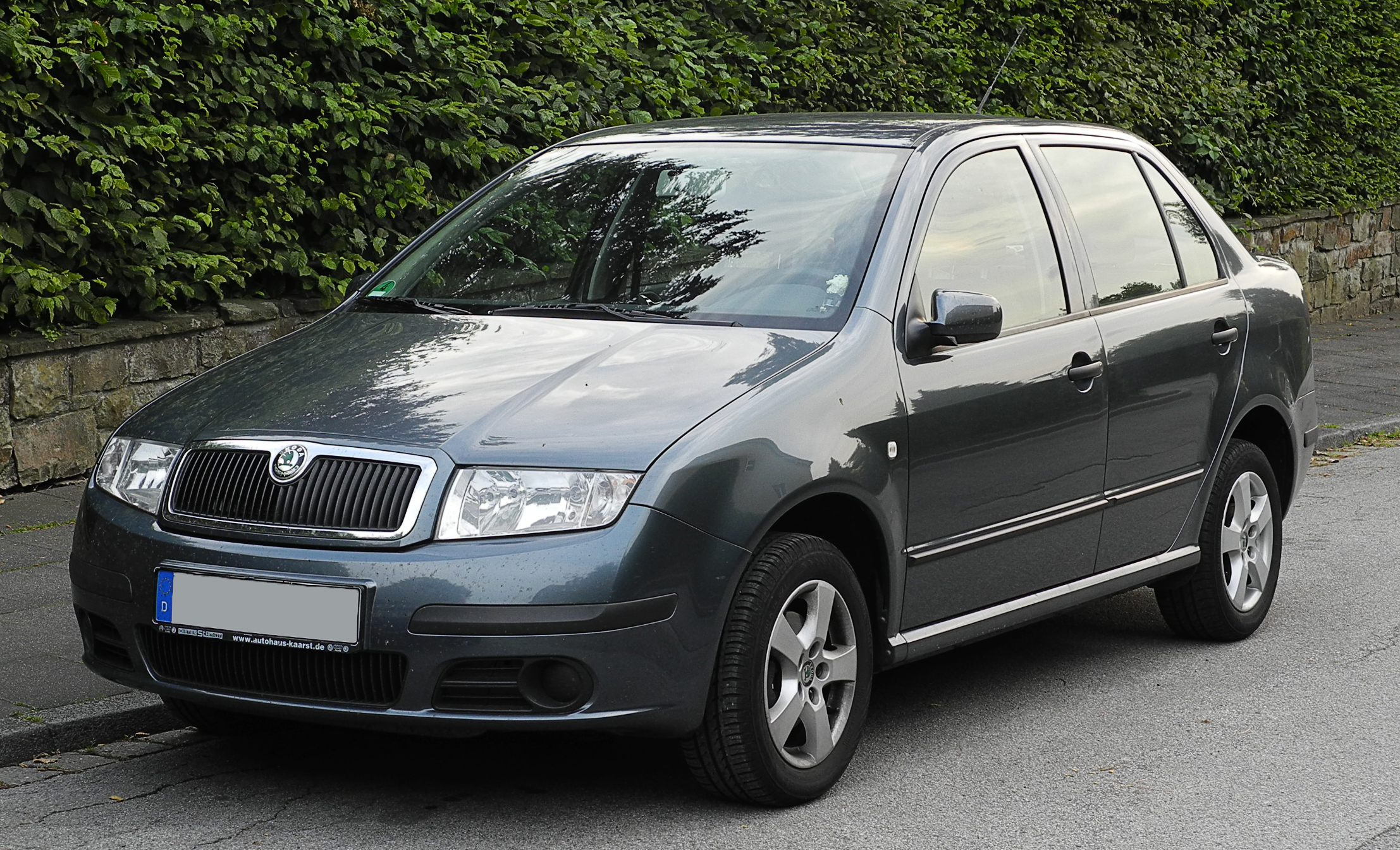 Skoda Fabia Sedan 1.4 16V (I, Facelift)